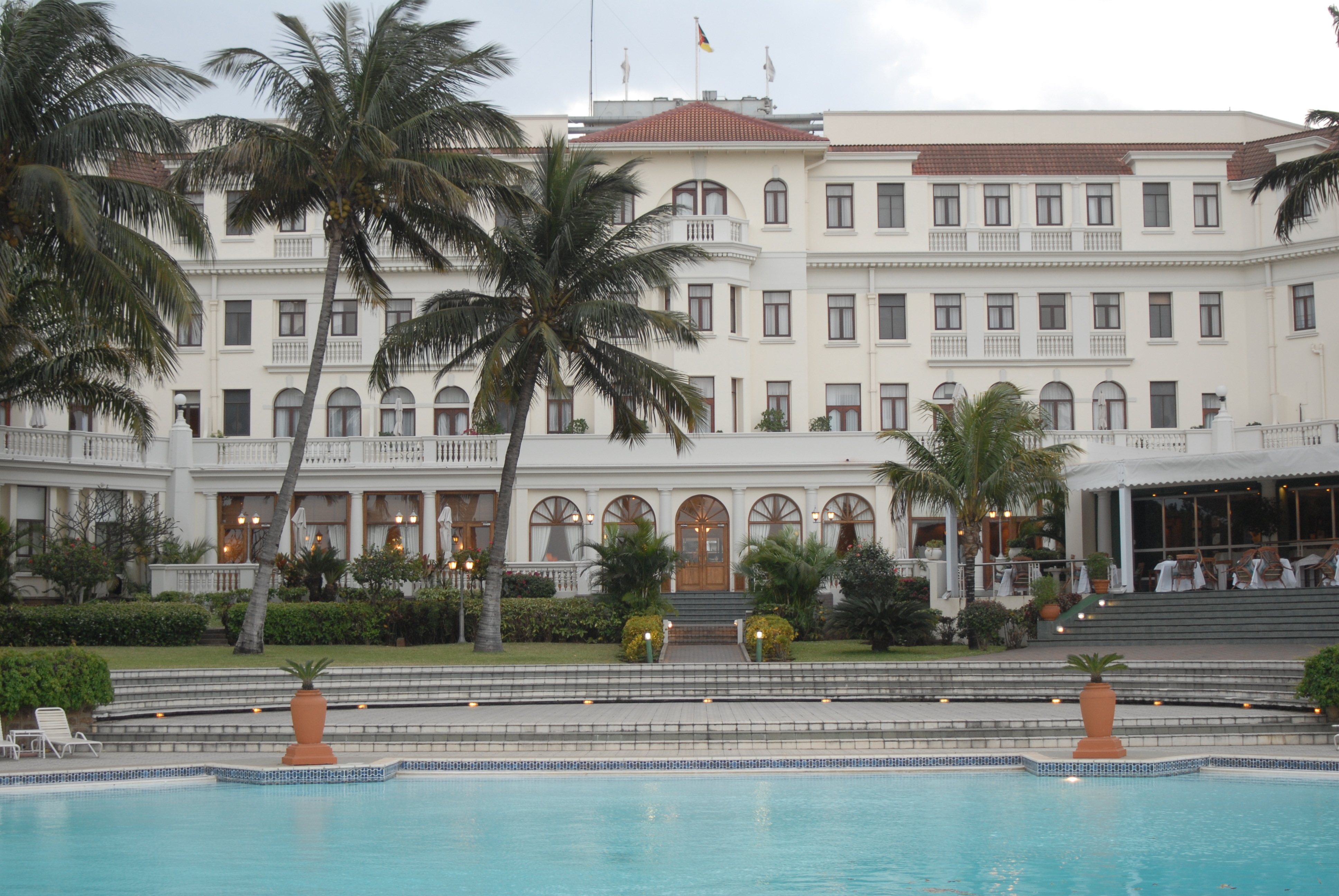 Polana Hotel, Maputo, Mozambique